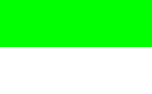 Bandera de la ciudad de Tobatí, Paraguay